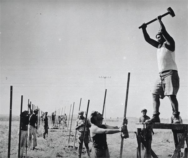 בנית גדר הצפון לאורך גבול הלבנון